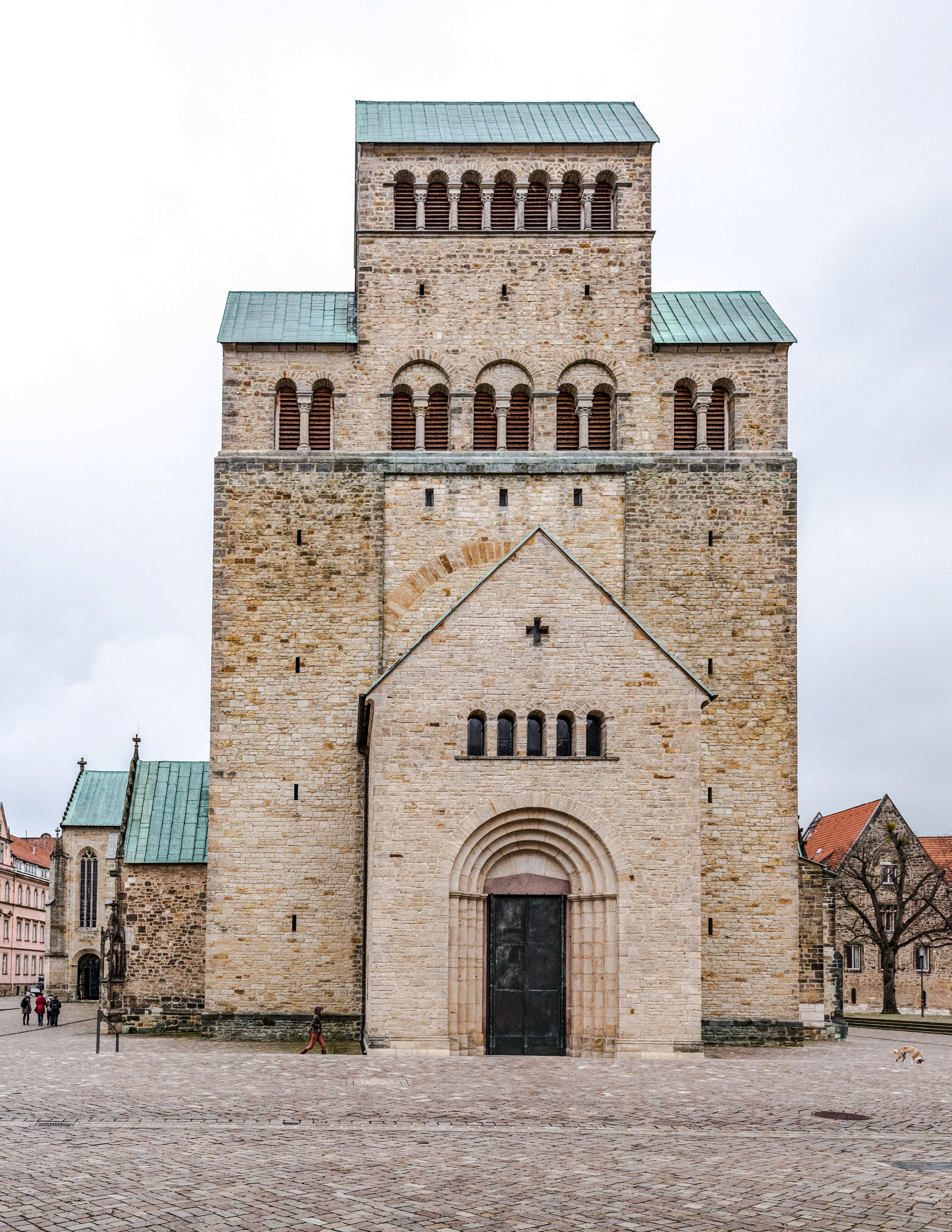 Hildesheim, Domhof, Dom, von Westen